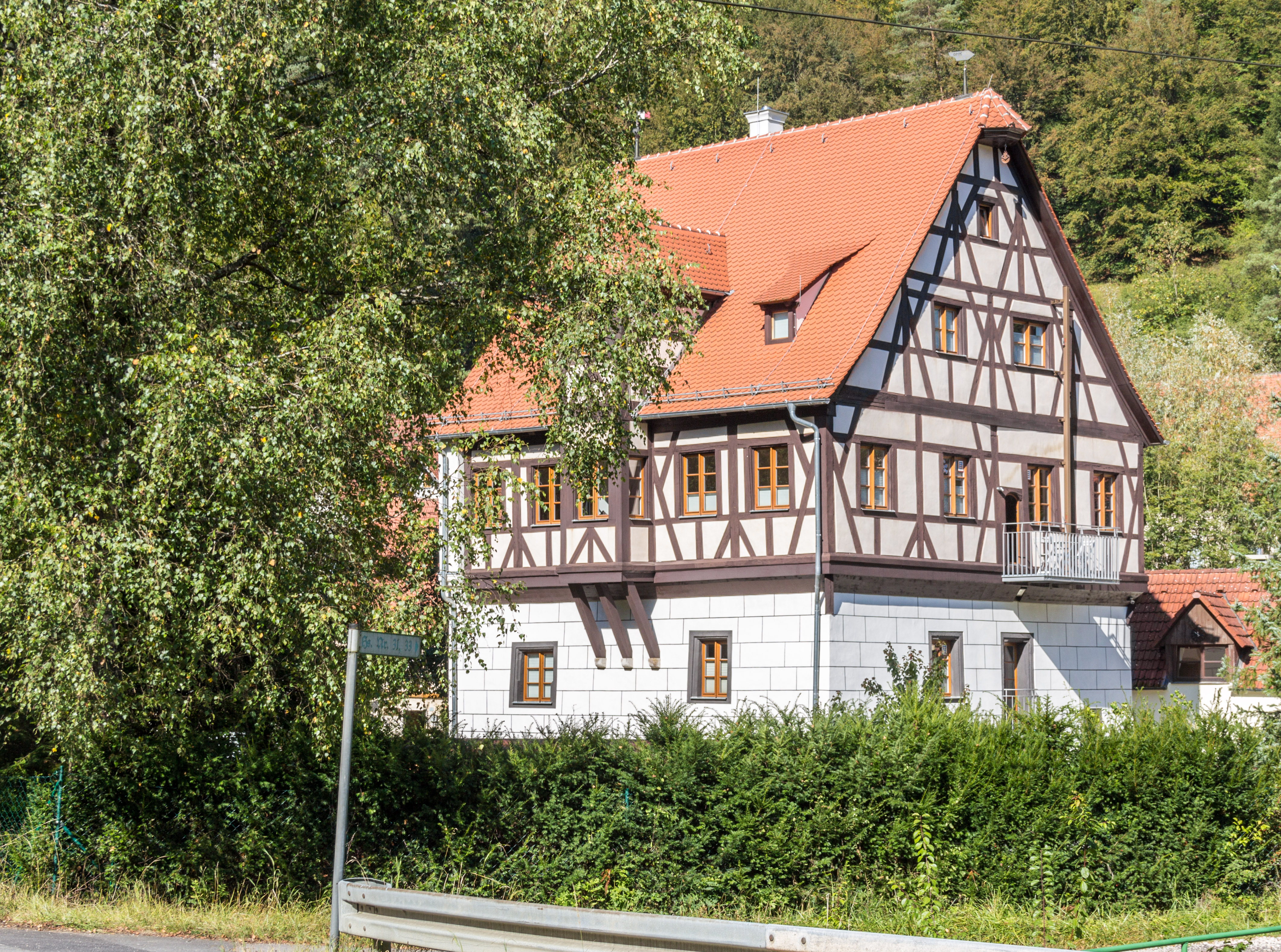 Ehemaliges Schloss, dreigeschossiger Satteldachbau, Erdgeschoss und 1. Obergeschoss, um 1450 (dendrochronologische Datierung), Decken und Fachwerkaufbau 2. Obergeschoss, um 1555 (dendrochronologische Datierung), barocke Überformungen, 18. Jahrhundert, HirschbachThis is a photograph of an architectural monument.